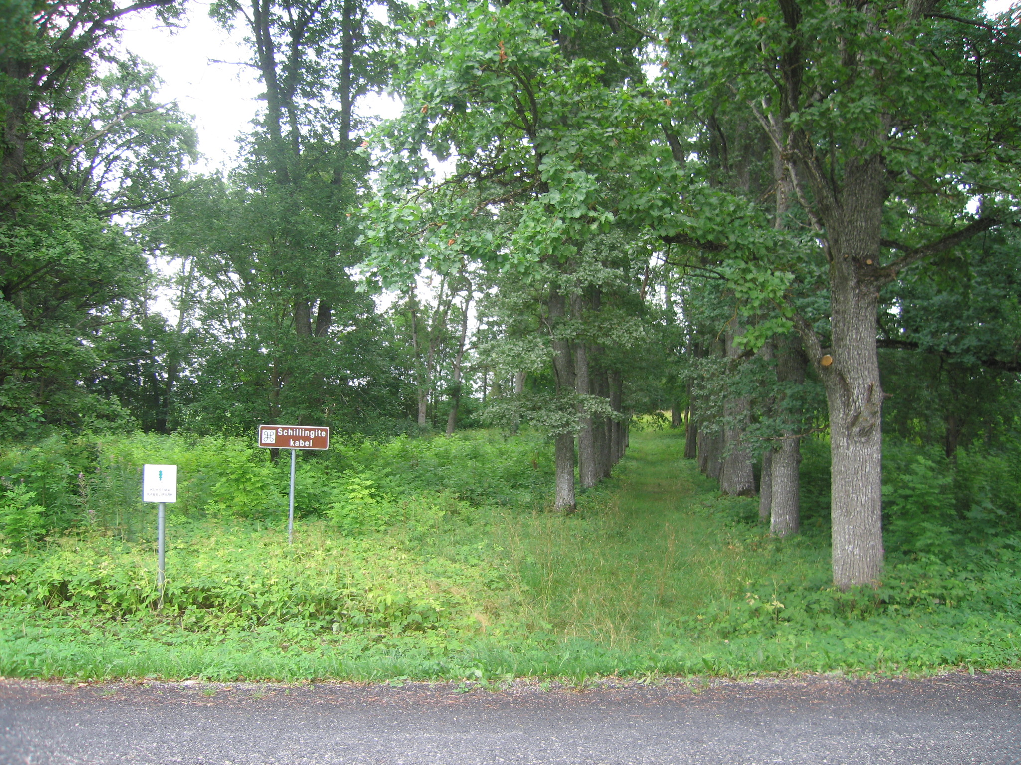 Puiestee kalmistule